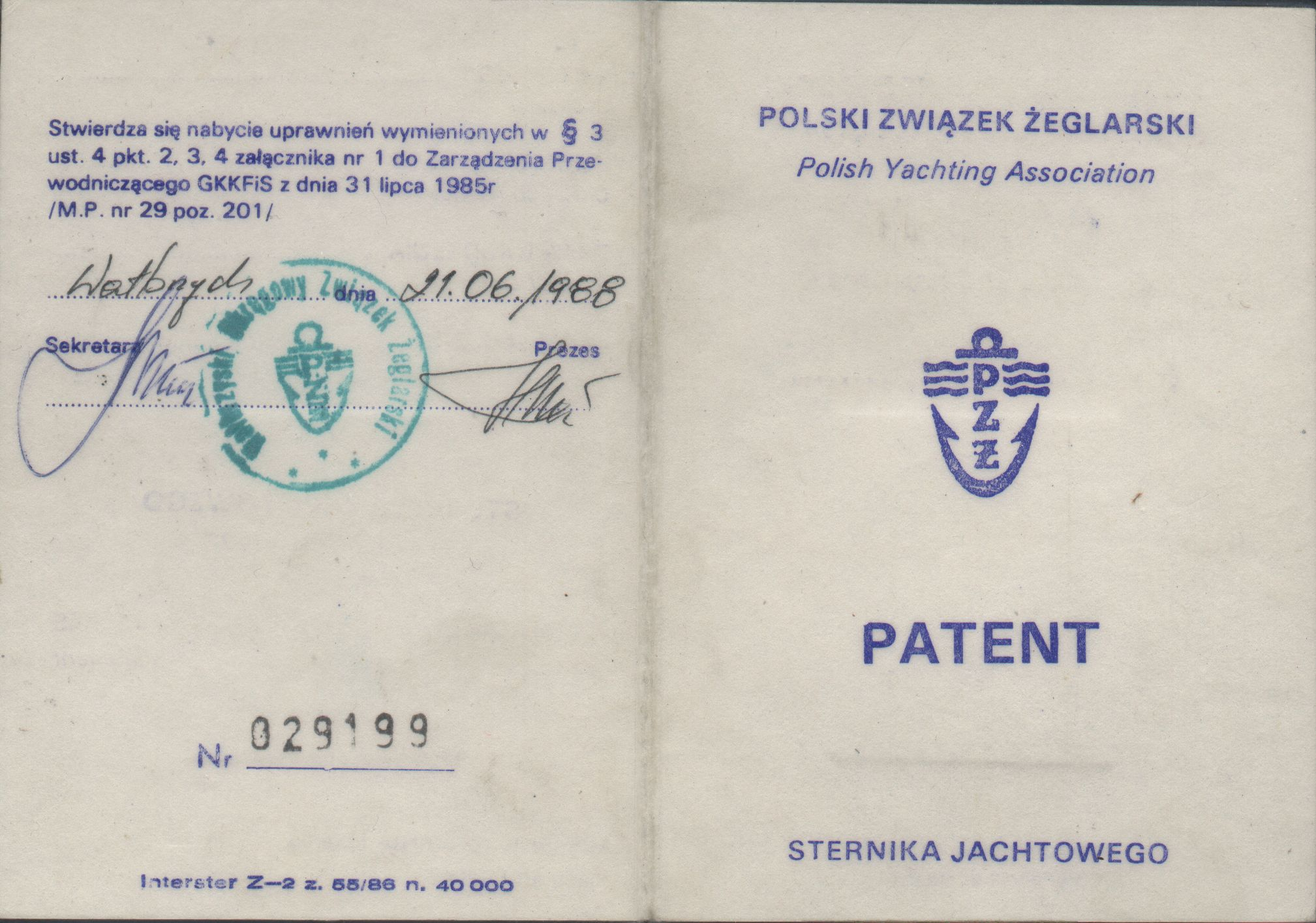 patent sternika jachtowego strona z potwierdzeniem uzyskania "pełnych uprawnień"